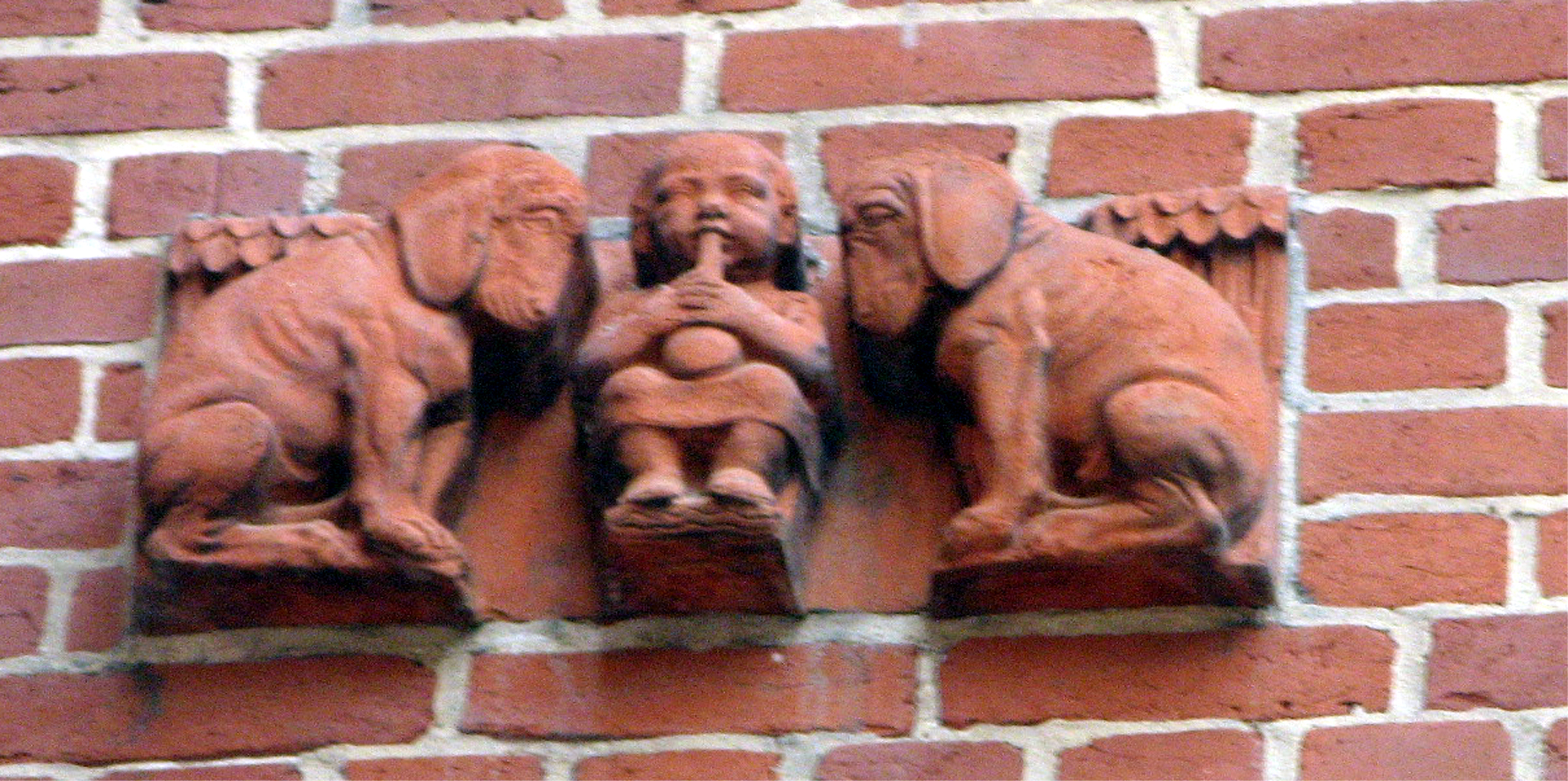 Eines der Reliefs von Georg Wrba (1872-1939) an der Hoffassade des Hoffmannschen Schulgebäudes in der Lasdehner Straße (Berlin-Friedrichshain).